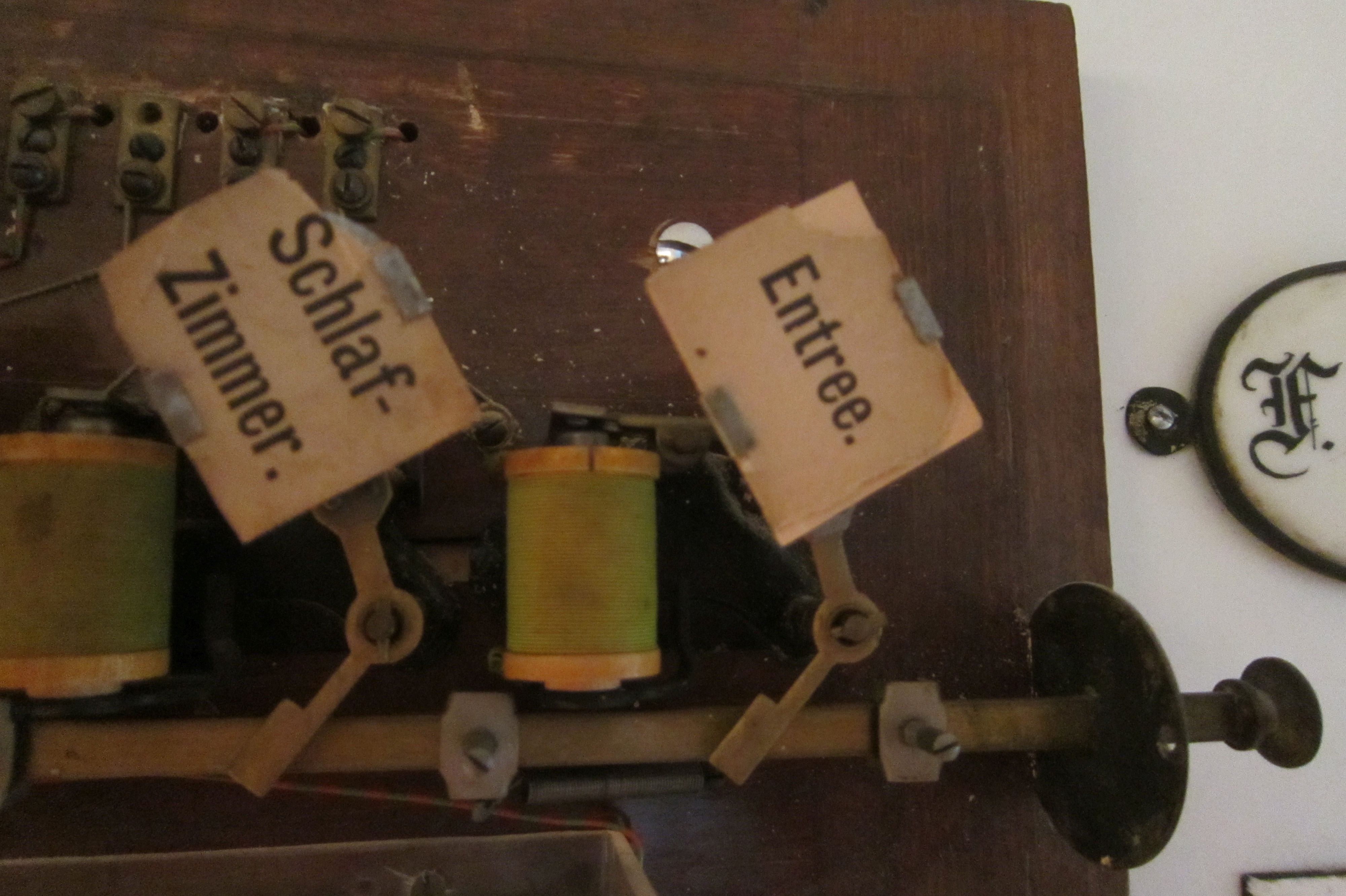 Elektrische Fallklappen aus dem Zimmertableau einer Rufanlage